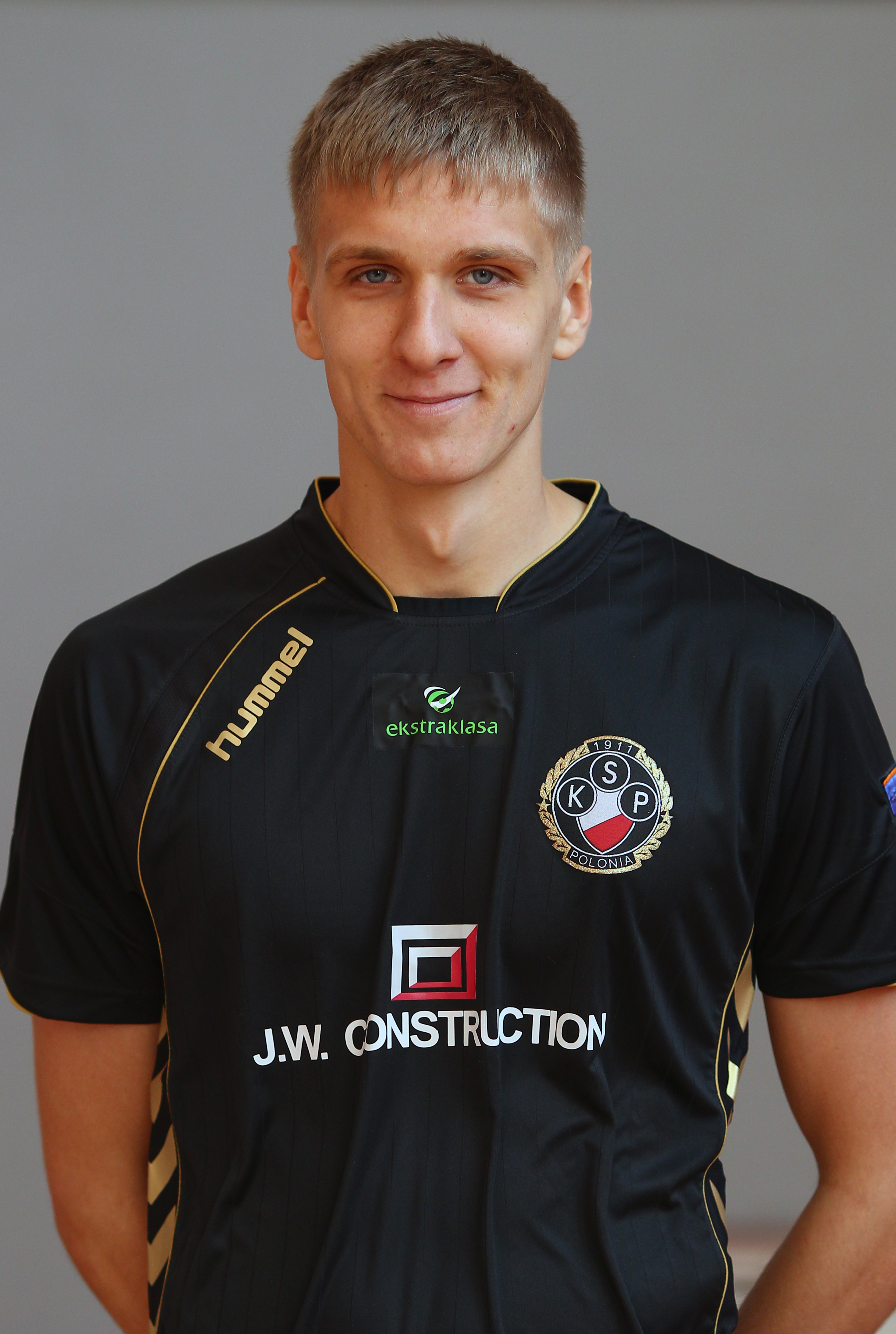 Łukasz Teodorczyk, player of Polonia Warszawa (2011)